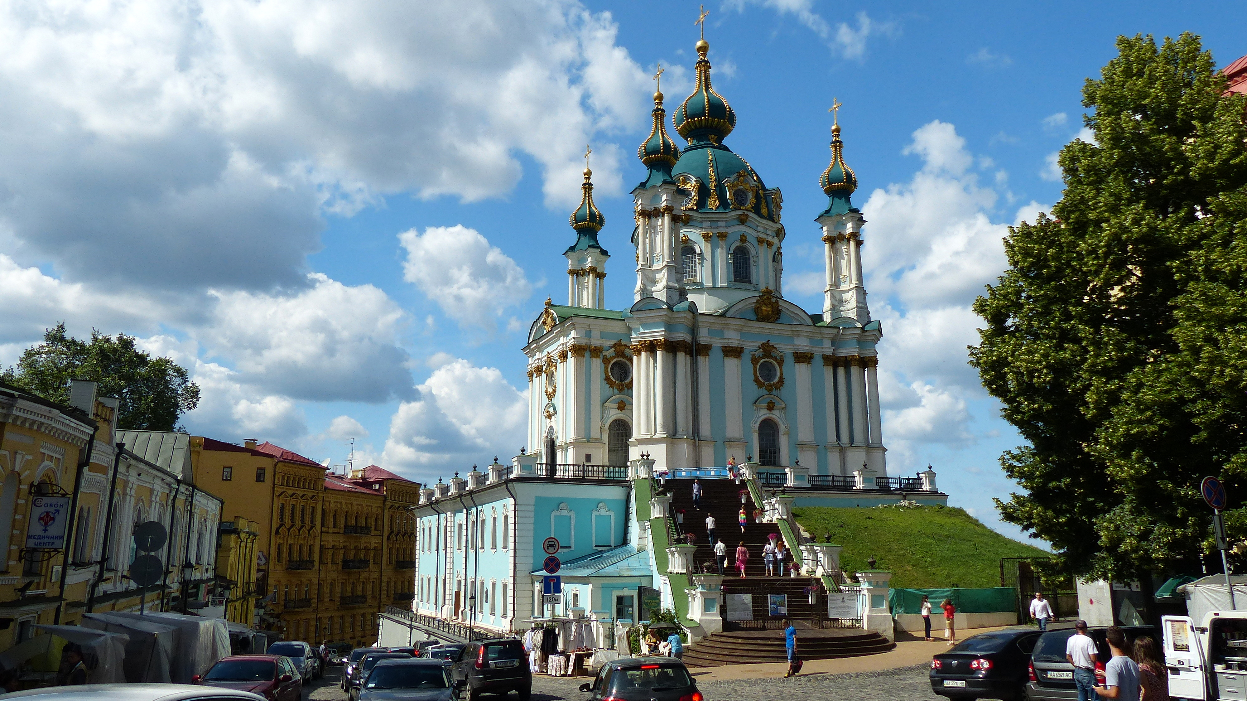 Церква Андріївська, Київ, Андріївський узвіз, 23